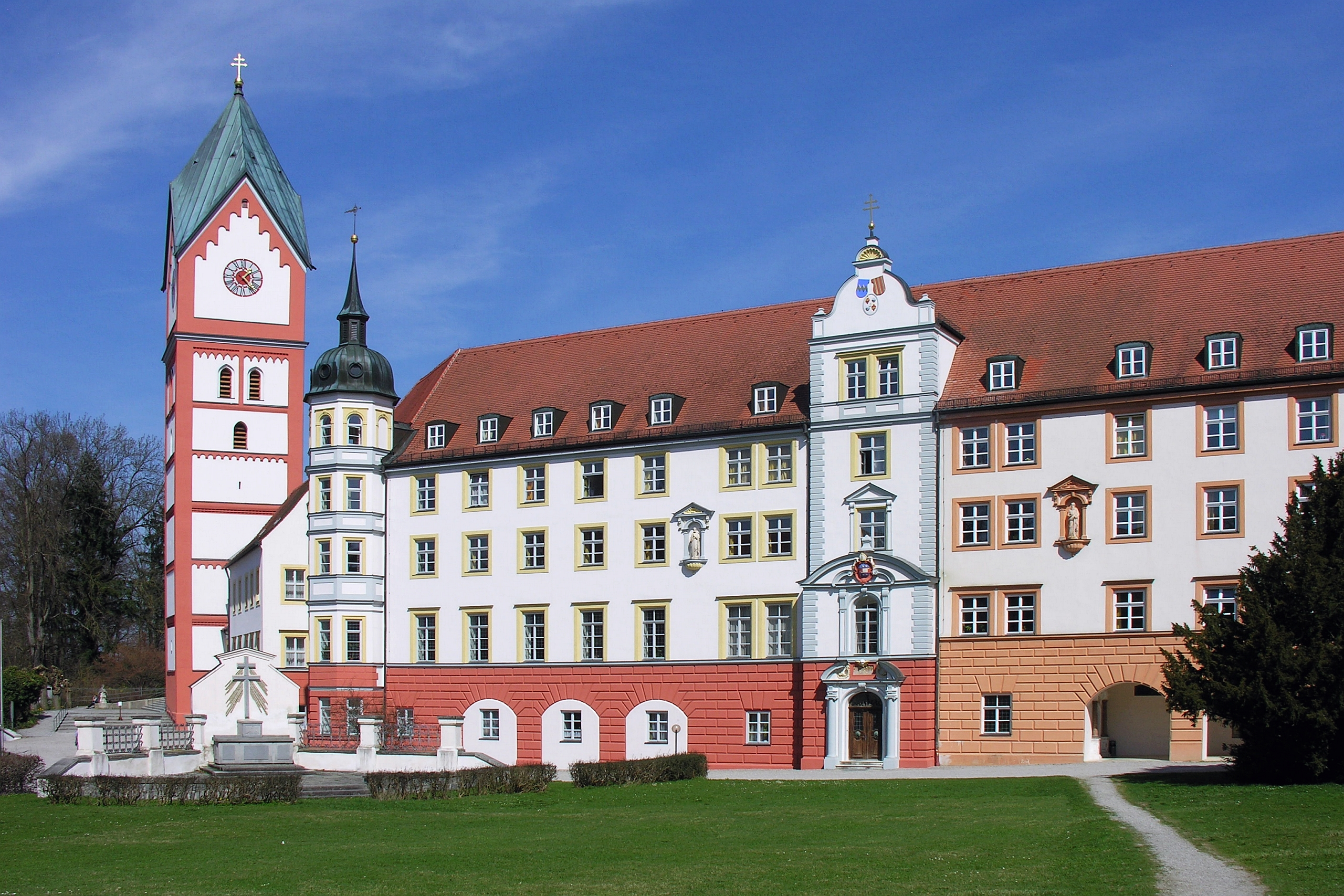 Benediktiner-Kloster Scheyern Ensemble mit Außenaltar - Ort Scheyern Bayern Bavaria Germany Foto 2011 Wolfgang Pehlemann DSCN7463